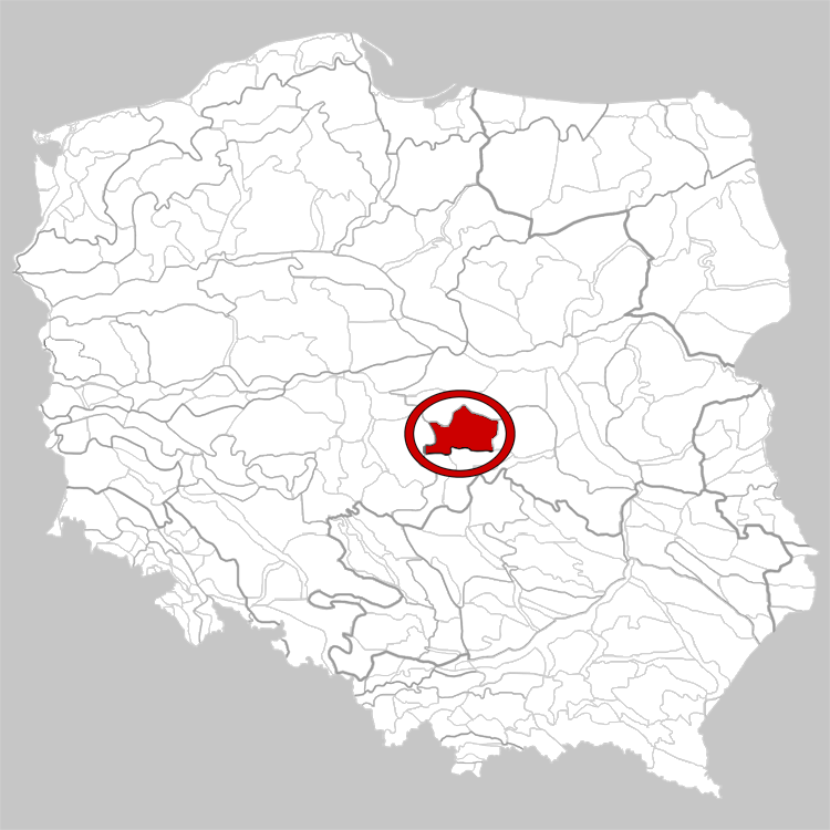 Physico-geographical regionalization of Poland Mezoregion 318.82 Łódź Heights Regionalizacja fizycznogeograficzna Polski Mezoregion 318.82 Wzniesienia Łódzkie